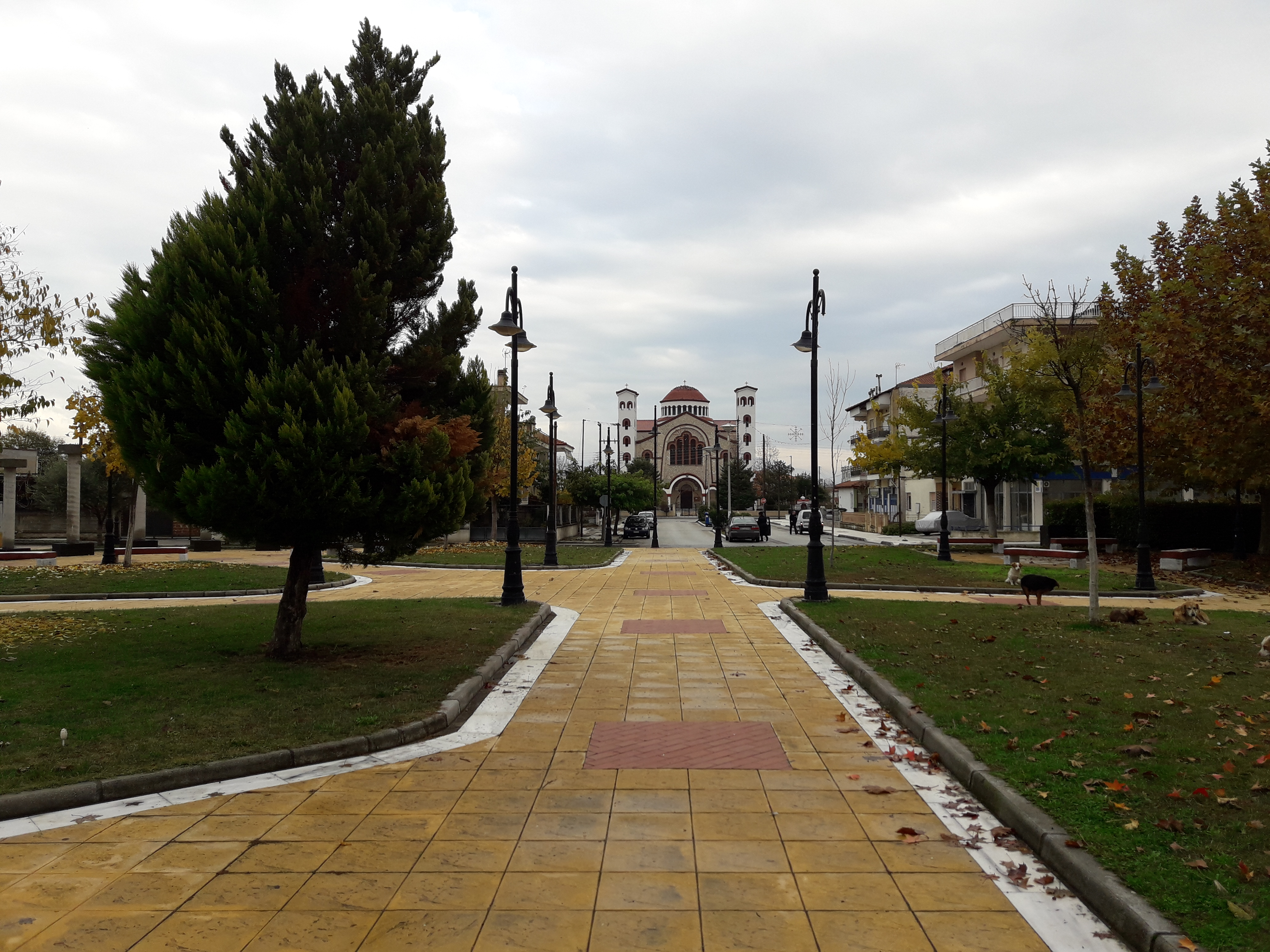 Άποψη της πλατείας Ηράκλειας